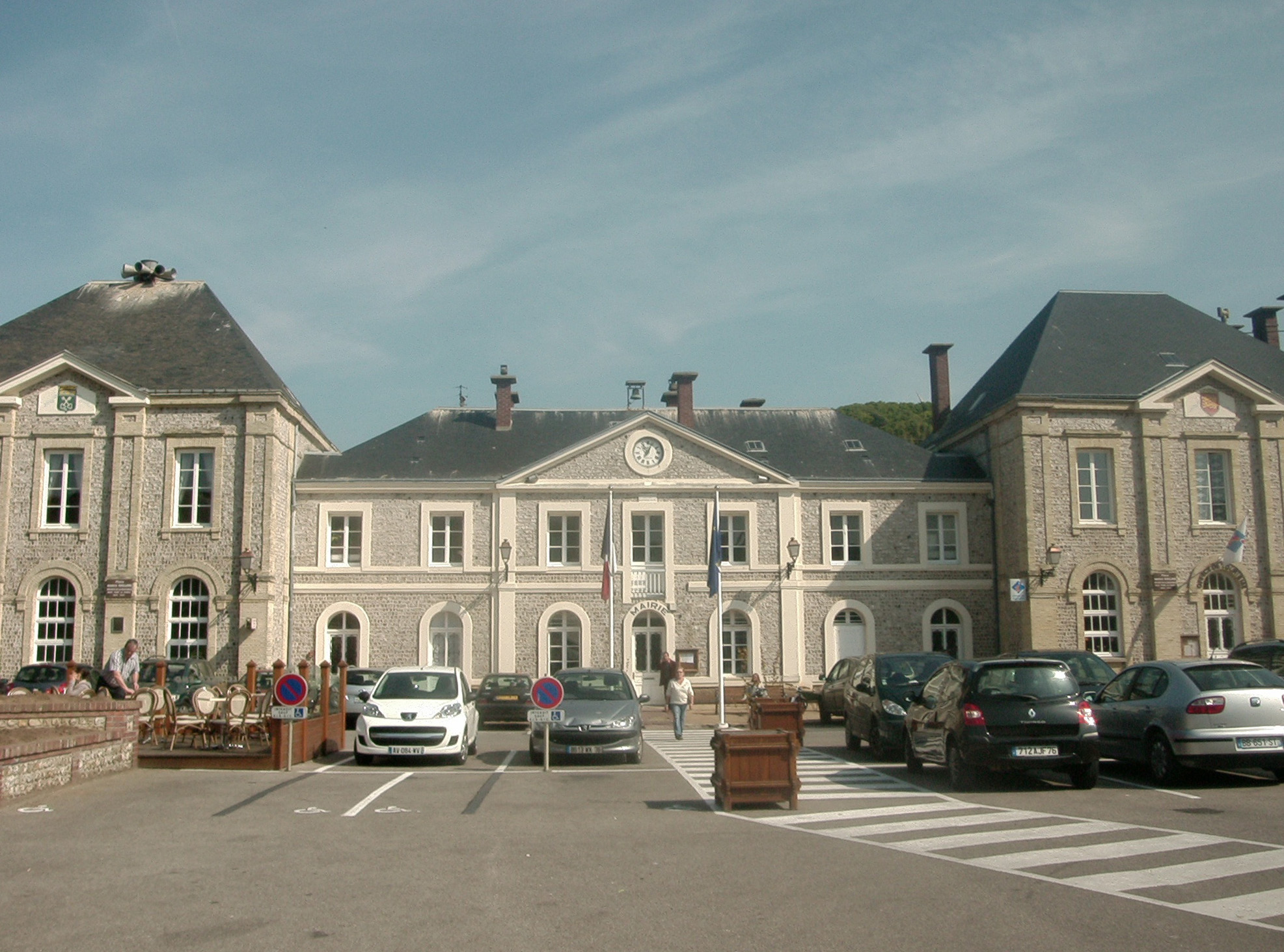 Étretat, Bürgermeisteramt (Mairie) Datum: 04.05.2011 Urheber: M. Pfeiffer alias Gordito1869 Quelle: privates Fotoarchiv des Urhebers